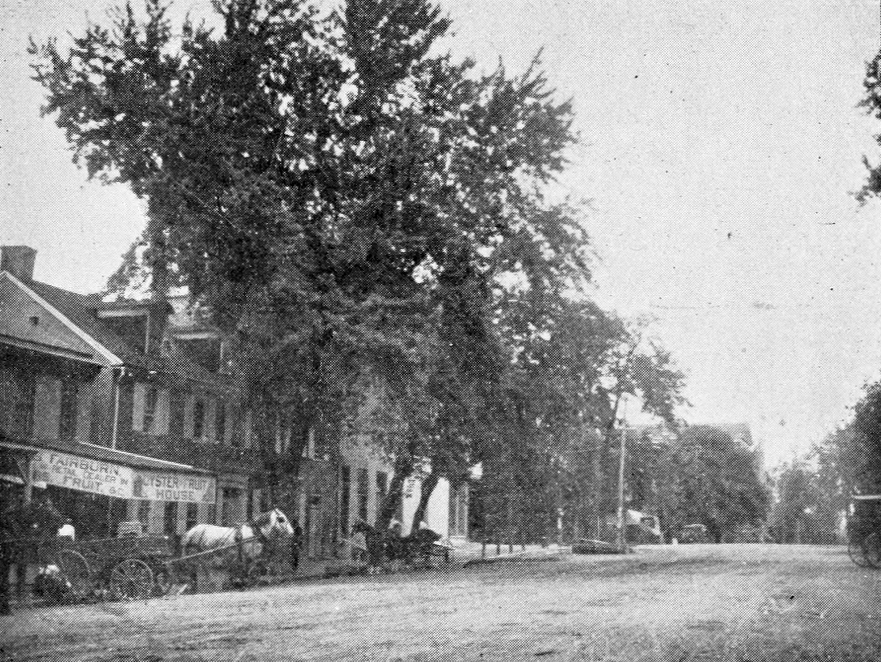 Central Square in Lebanon, Pennsylvania (1895)